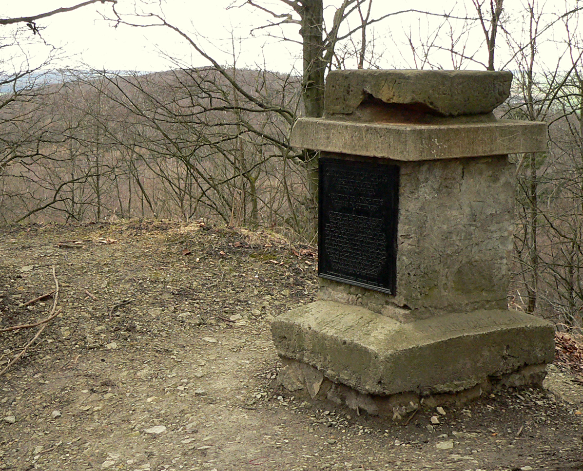 Gaußstein oberhalb der Burgruine Lichtenberg in Salzgitter